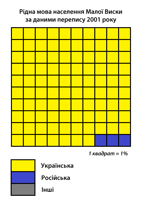 Інфографіка розподілу населення Малої Виски за рідною мовою згідно з даними перепису 2001 року. Джерело: Розподіл населення Кіровоградської області за рідною мовою (у % до загальної чисельності населення) за переписом 2001 року